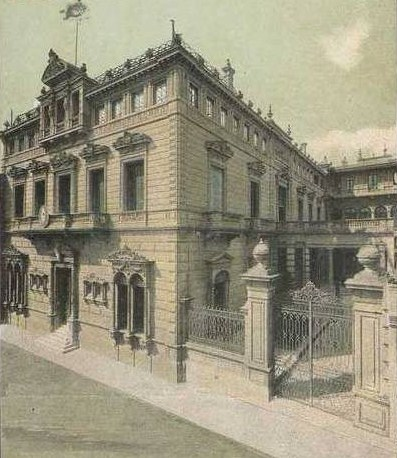 Sede del Rectorado de la Universidad de Buenos Aires desde fines del siglo XIX. Edificio que sobrevive en la actualidad, modificado.